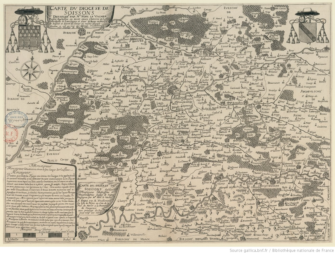 Carte du diocese de Soissons / Dessignee par Mr Noel en 1656 Provenance : Bibliothèque nationale de France